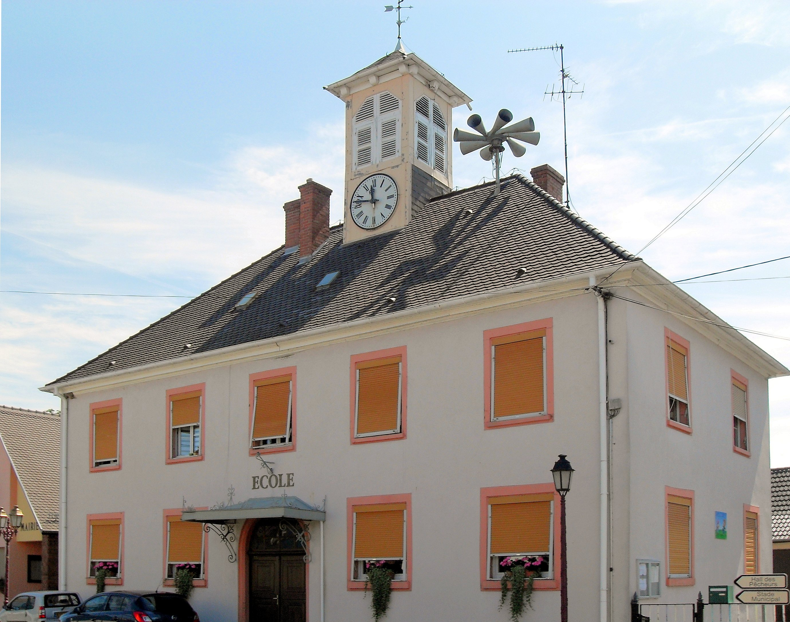 L'école de Stattmatten